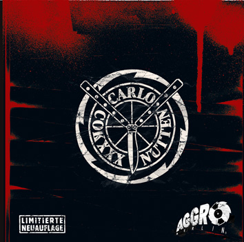 Cover des Albums „Carlo Cokxxx Nutten“ (Limitierte Neuauflage)